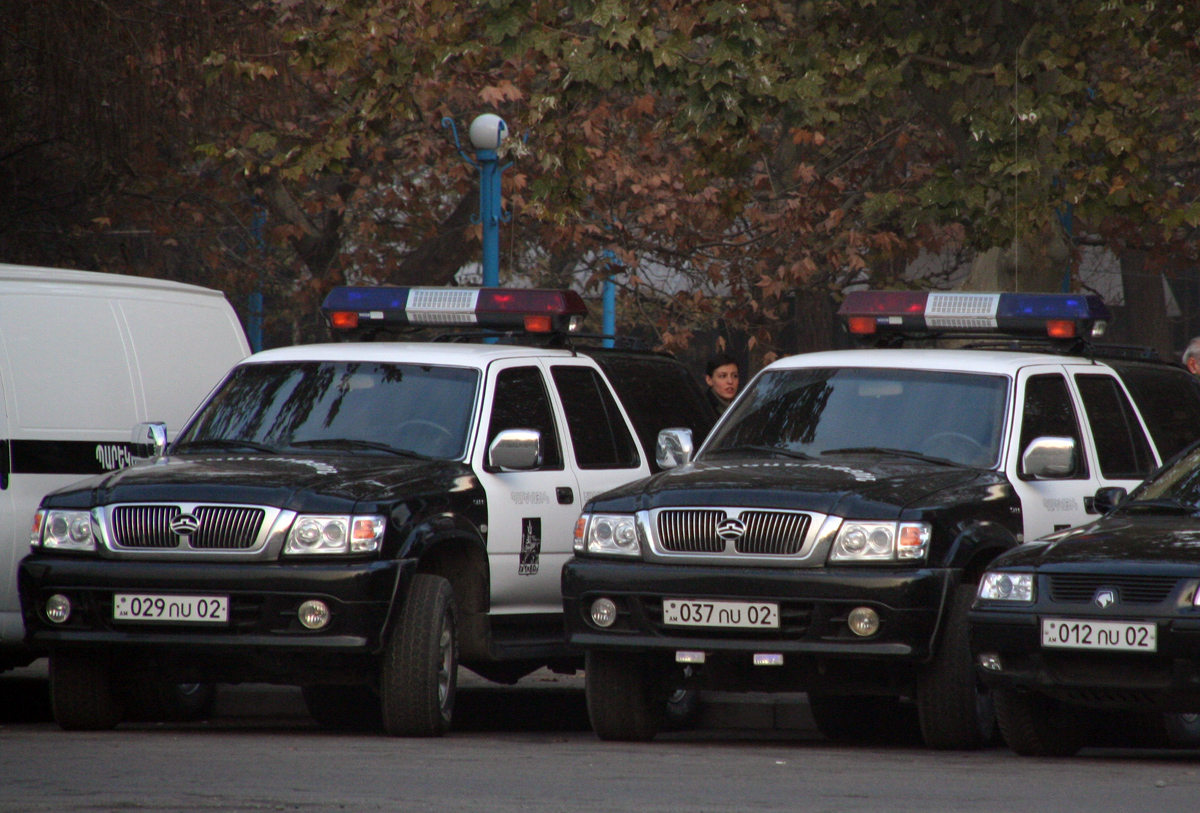 Police municipale Erevan Arménie, équipée en voitures SUV chinoises Deer, de la marque Great Wall